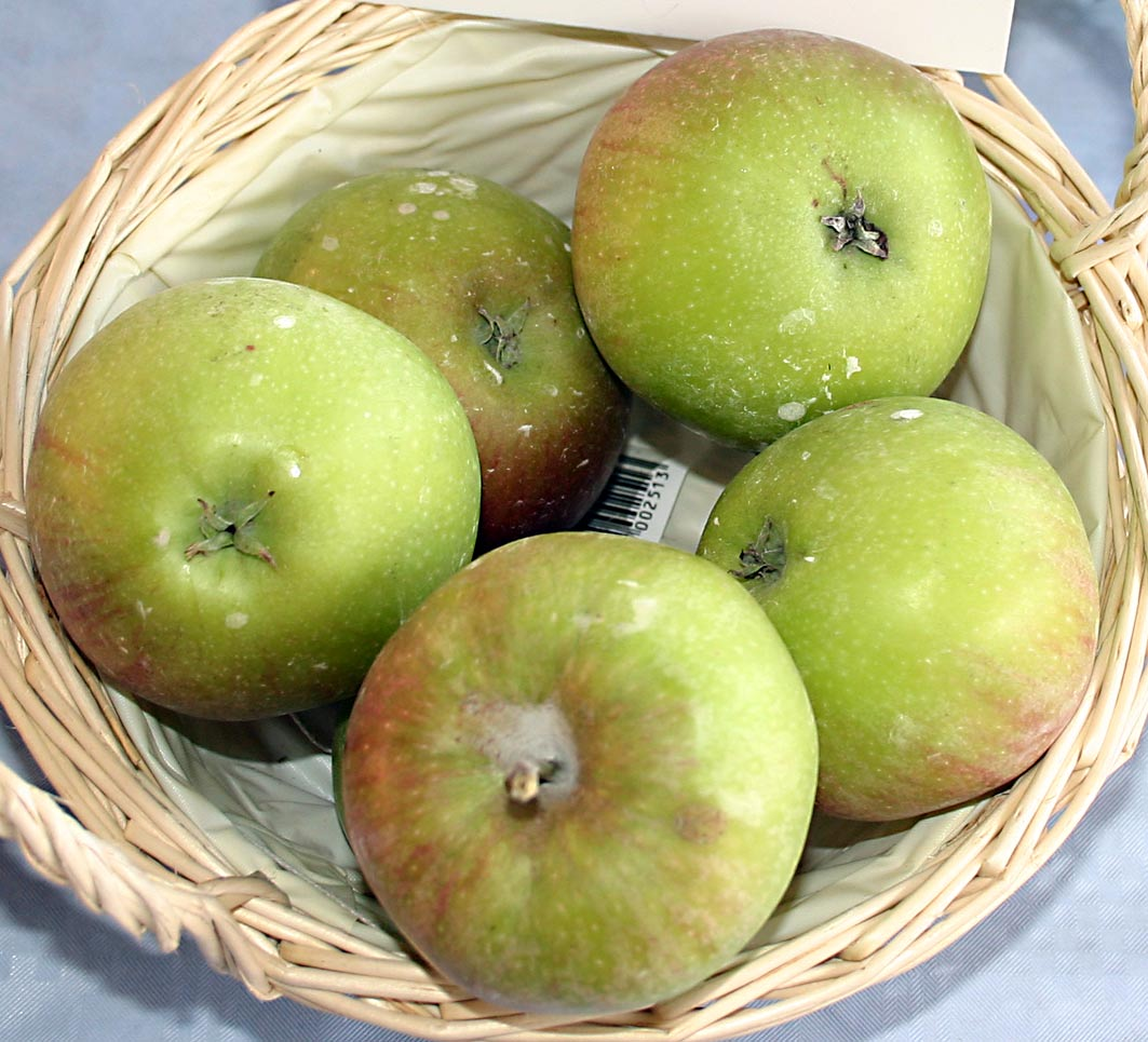 Malus "Suntan", Büdingen